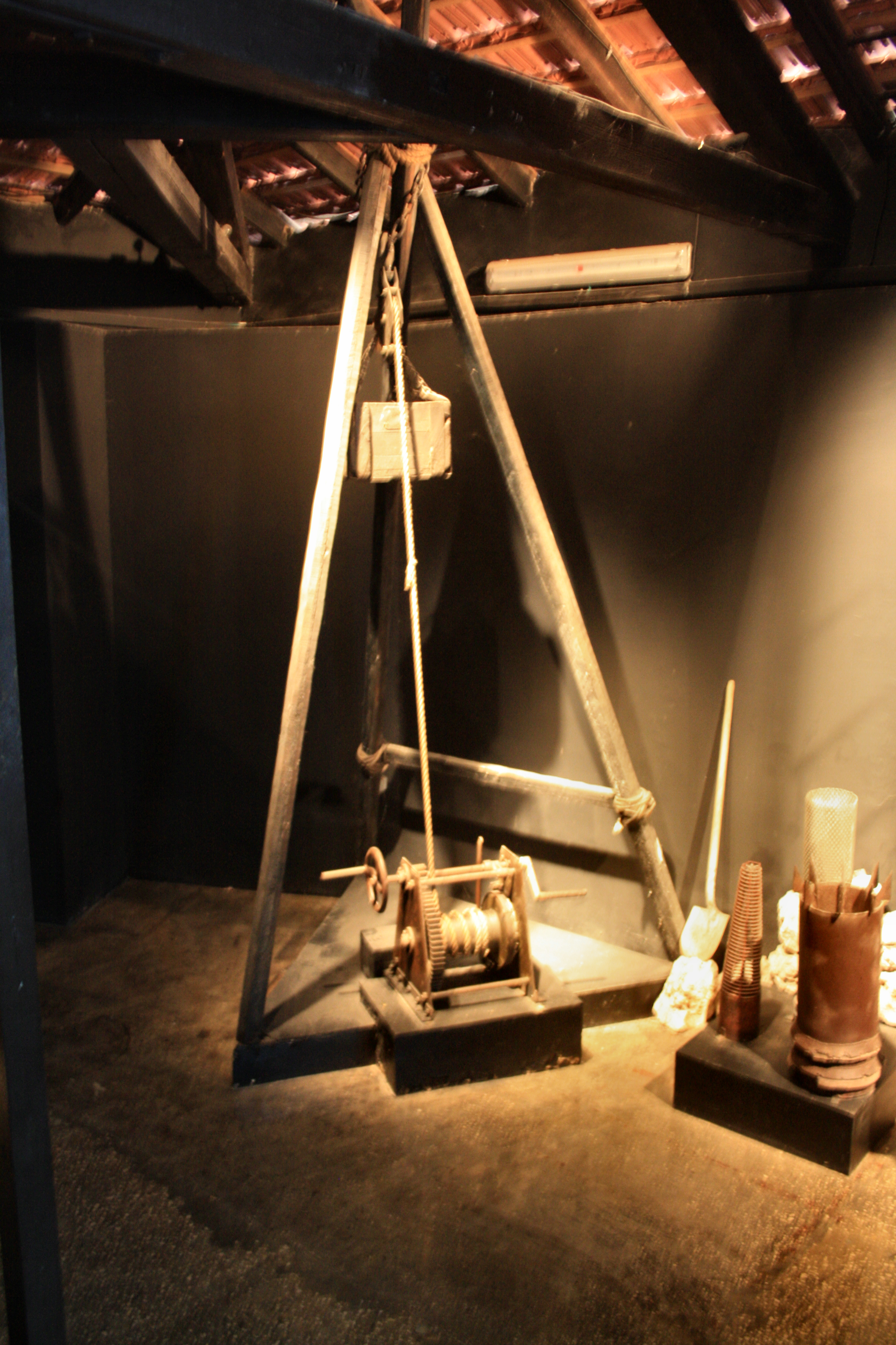 רחוב רוטשילד 19, ראשון לציון. באר "מצאנו מים"', הבאר הראשונה שנחפרה בראשון ובה נמצאו מים שאפשרו את קיום המושבה.